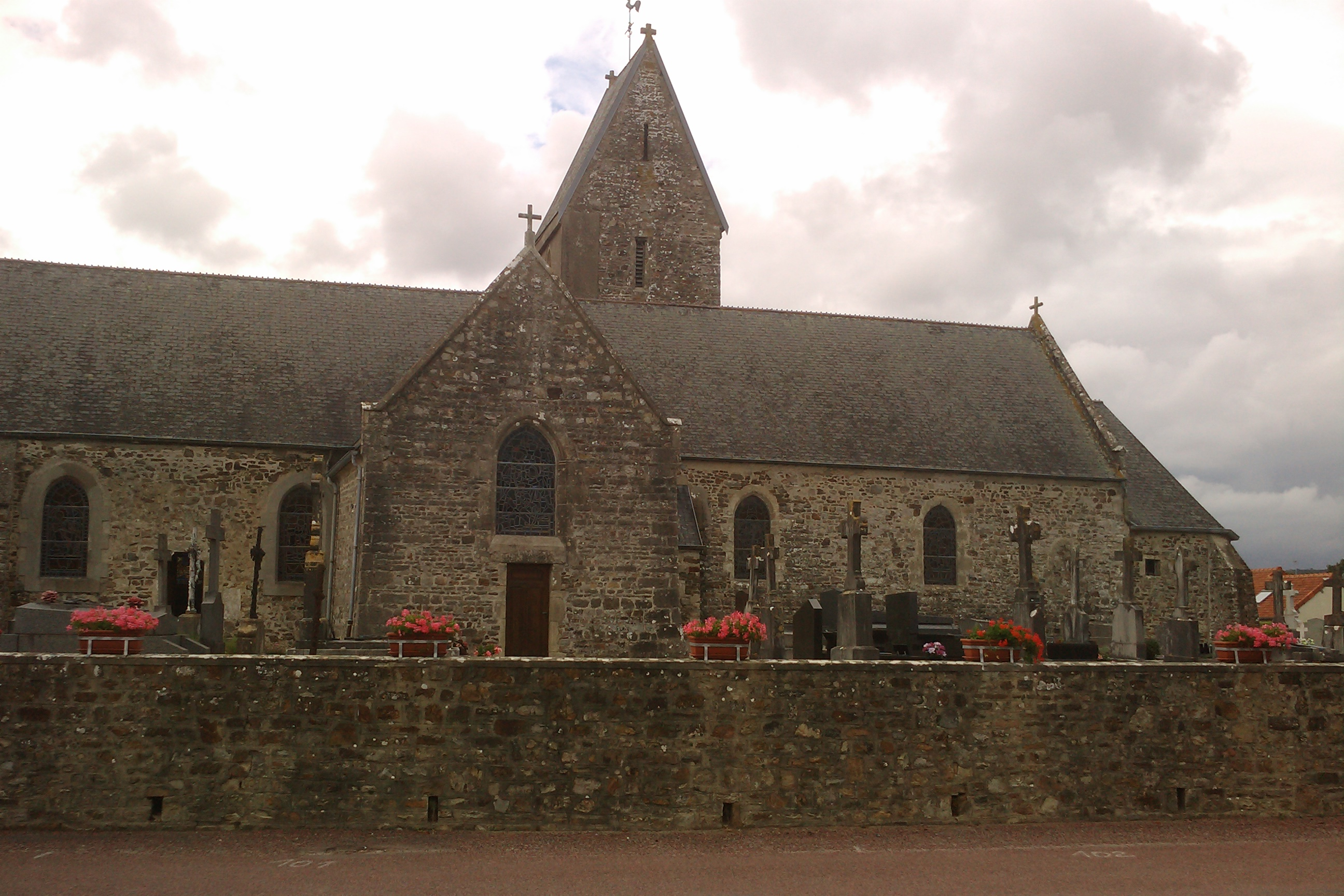 Photo de l'église de Bolleville